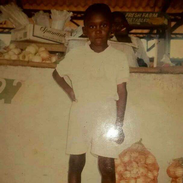 Chi-Chewa: B'Flow pamene iye anali mnyamata